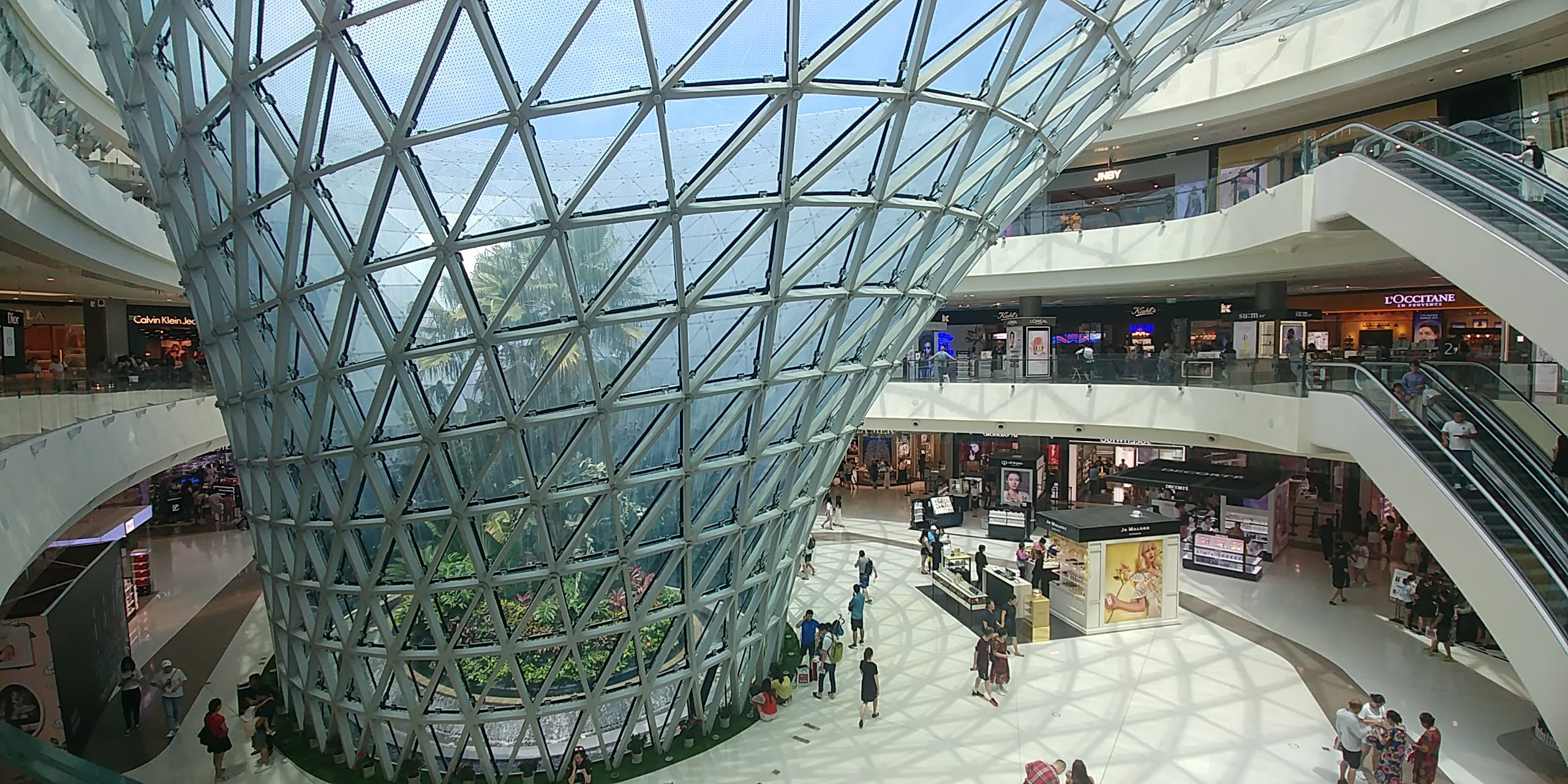 中文（香港）: 中國免稅三亞免稅店